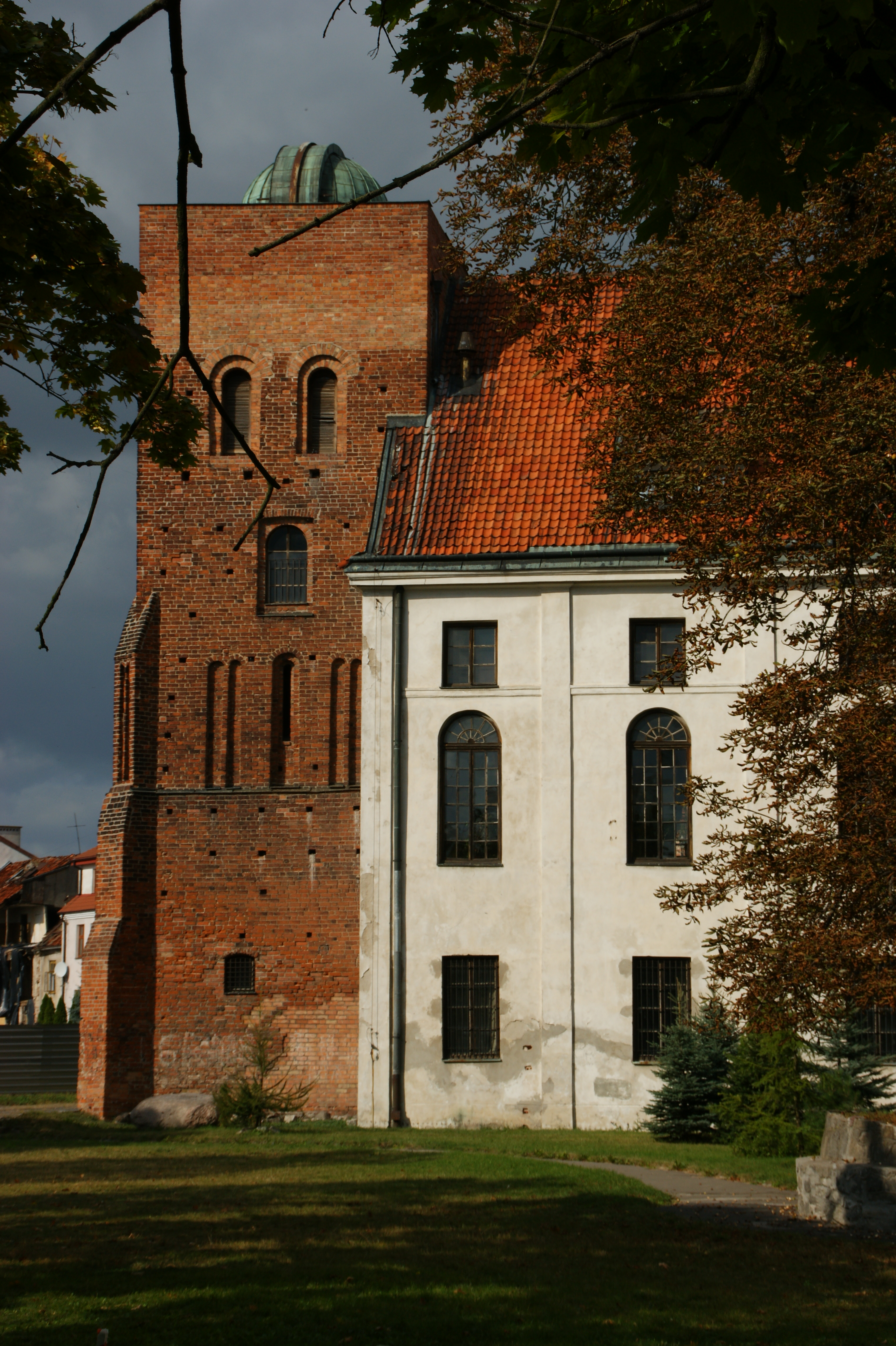 Wieża d. kościoła pw. św. Michała, przy kolegium jezuickim, ob. liceum "Małachowianka", mur., 1 poł. XV, 1764, Płock, ul. Małachowskiego 1 01.1959.